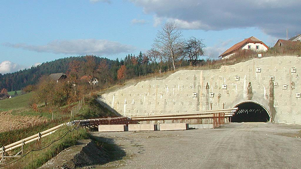 Westportal des künftigen Koralmtunnels (Erkundungstunnel Mitterpichling).